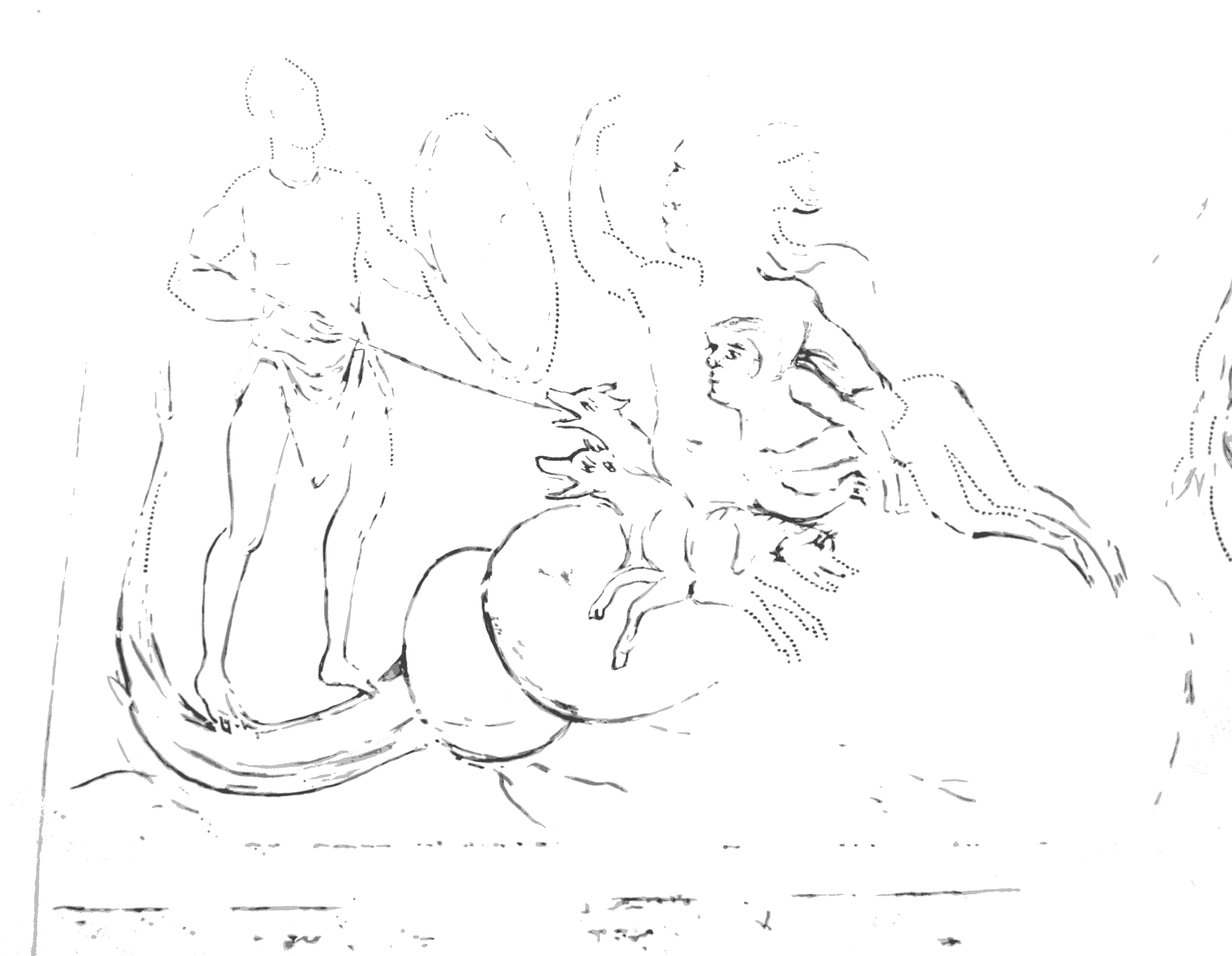 Dieses Foto zeigt eine Zeichnung des Odysseusbildes auf einer Schautafel im Westwerk in Corvey.